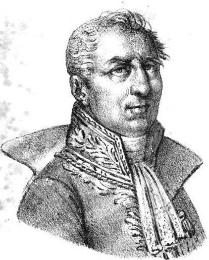 Lebrun